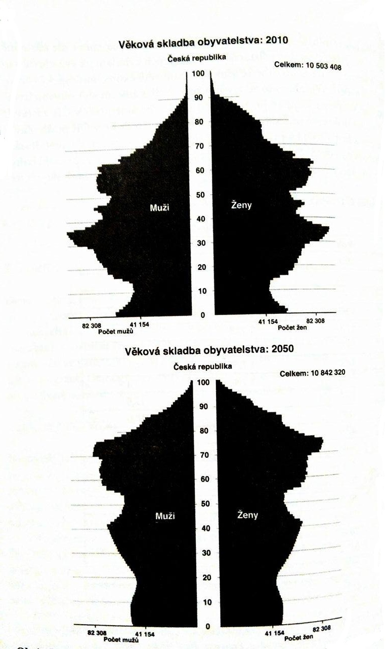 Z obrázku lze vyčíst, jaké bylo a jaké pravděpodobně bude věkové složení obyvatel v České republice